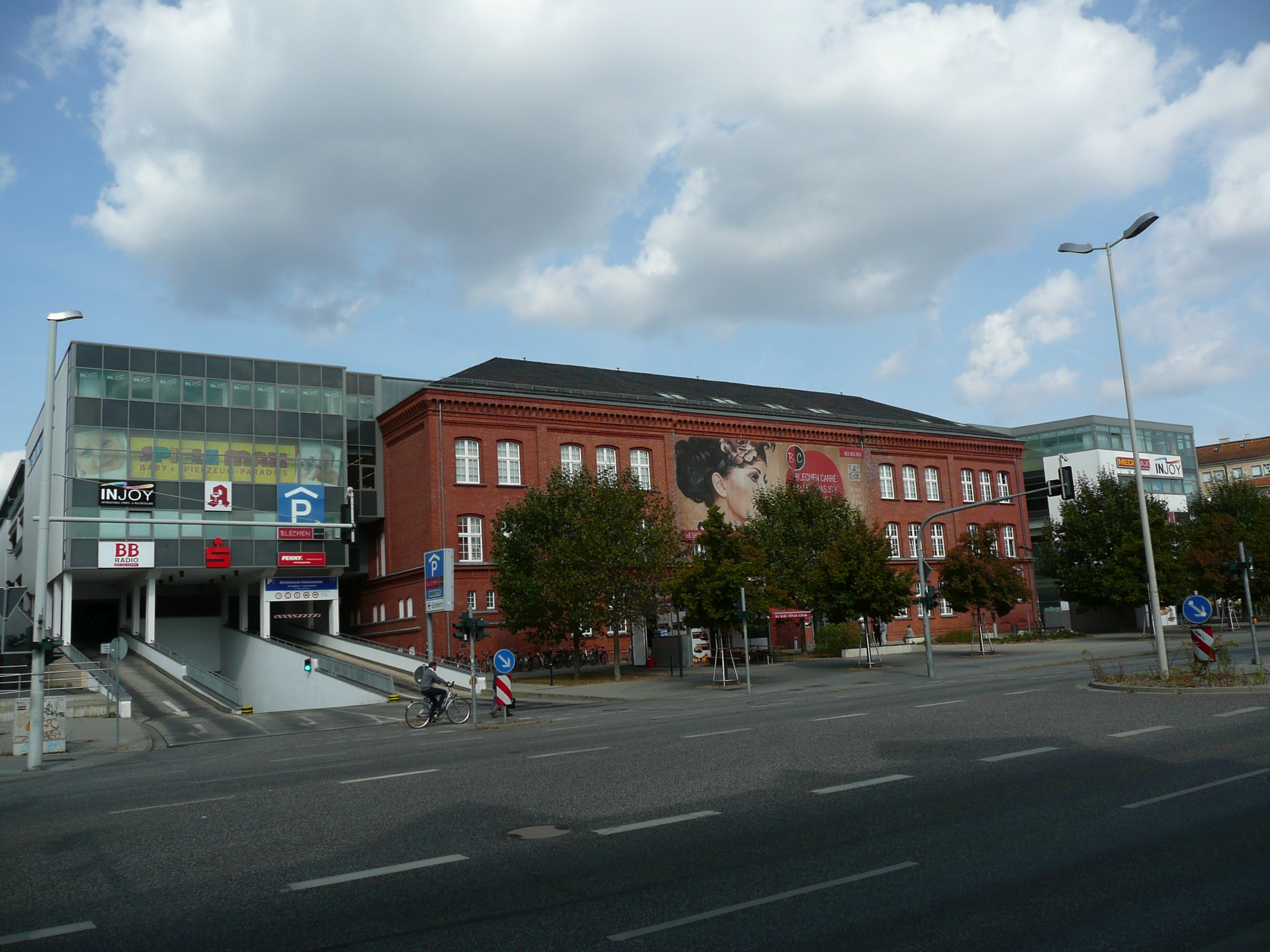 Blick auf das Blechen Carré in Cottbus mit seiner historischen Fassade der Carl Blechen-Grundschule